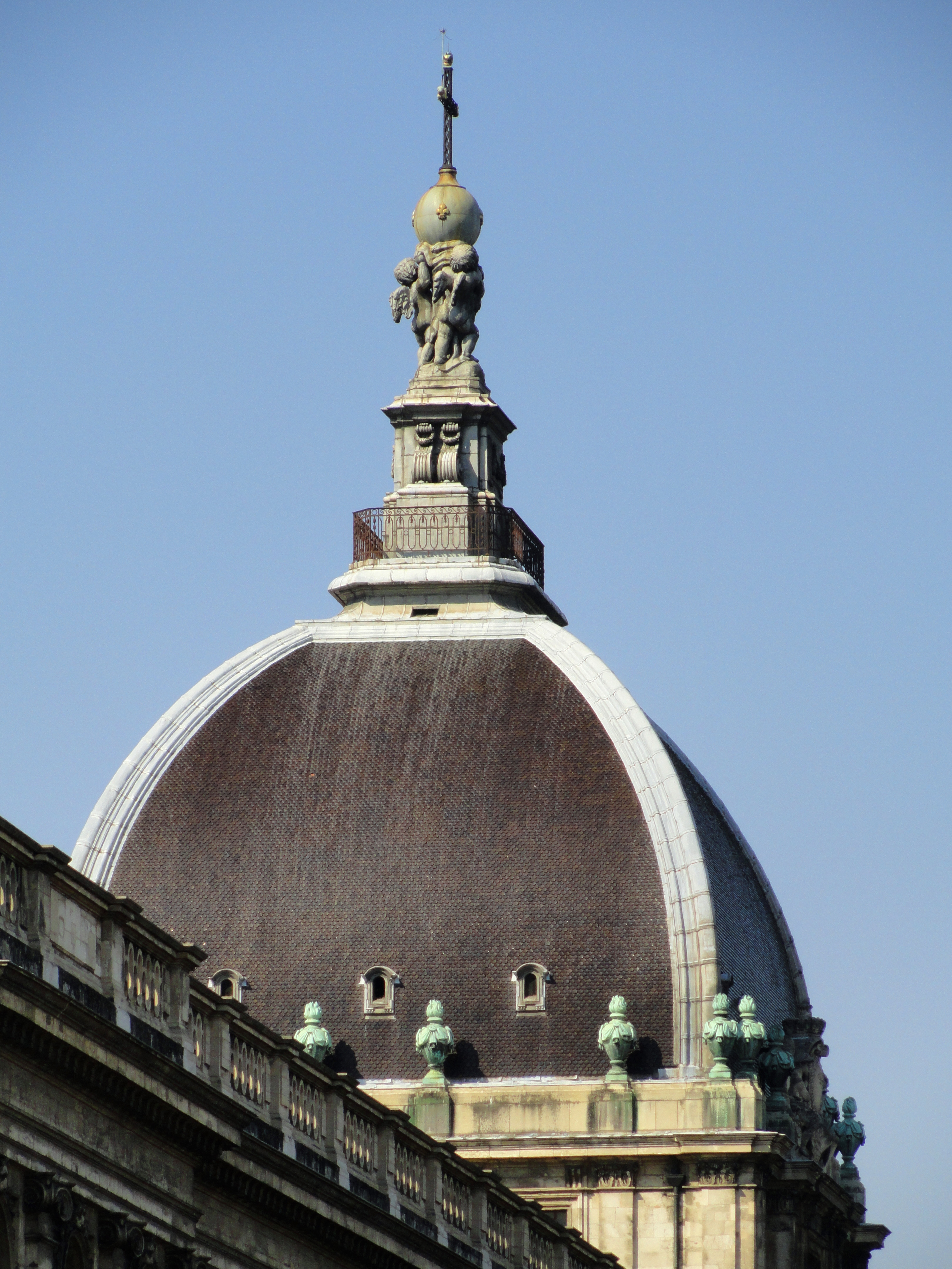 Side view of dome, Hôtel-Dieu de Lyon, Lyon, France.